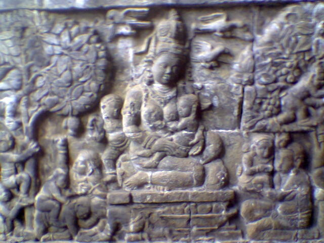 Gemaakt door Meursault2004 op 10 december 2005